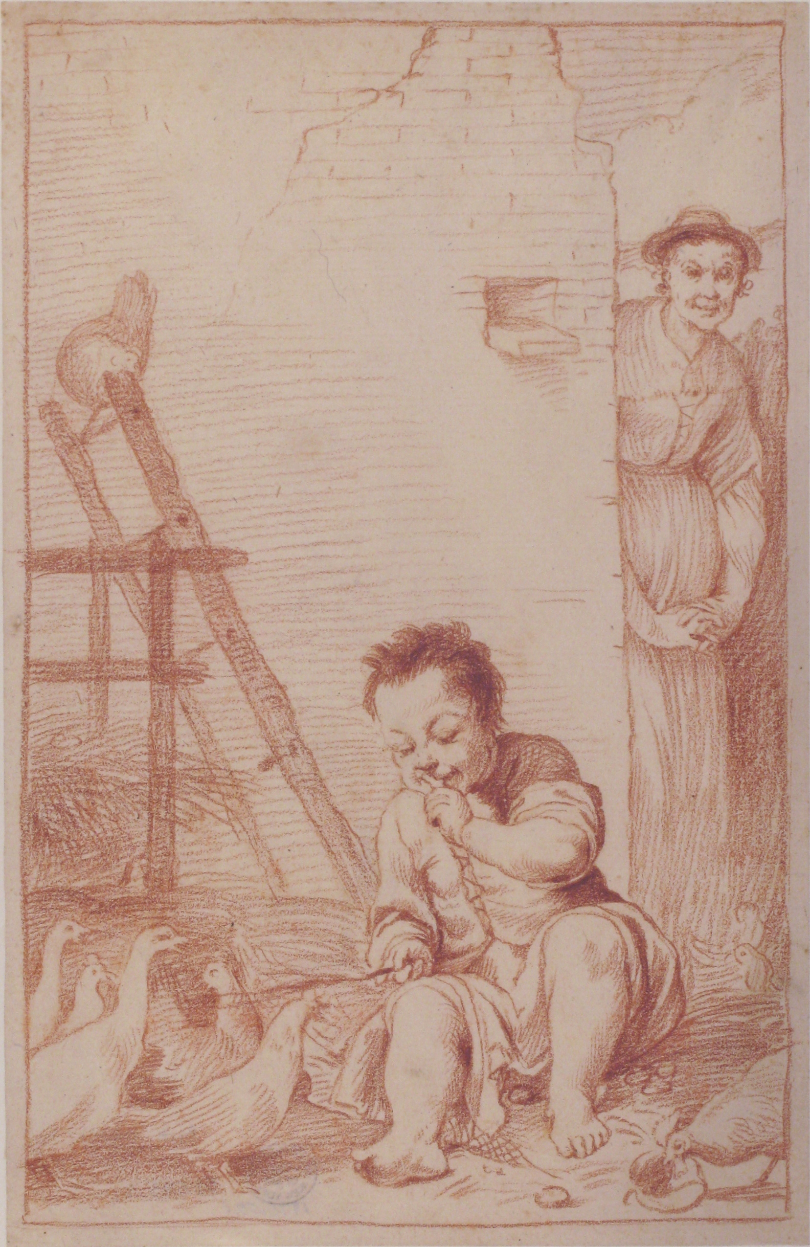 Drawing; Drawings